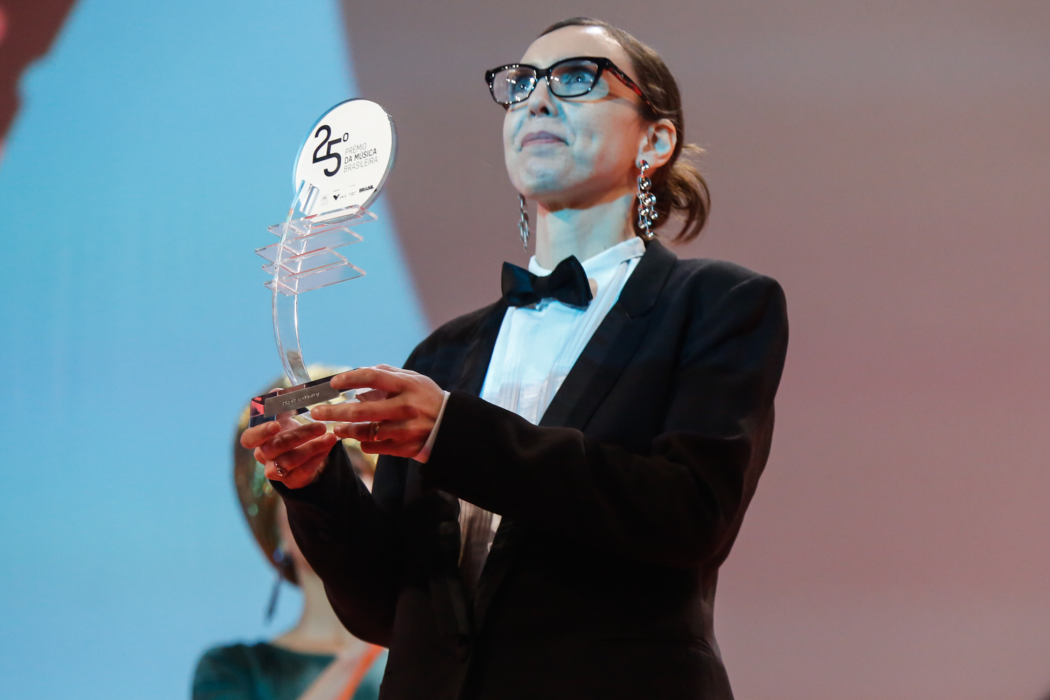 Adriana Calcanhoto durante o 25o Premio da Musica Brasileira no Theatro Municipal. Foto: Roberto Filho (14/05/14)